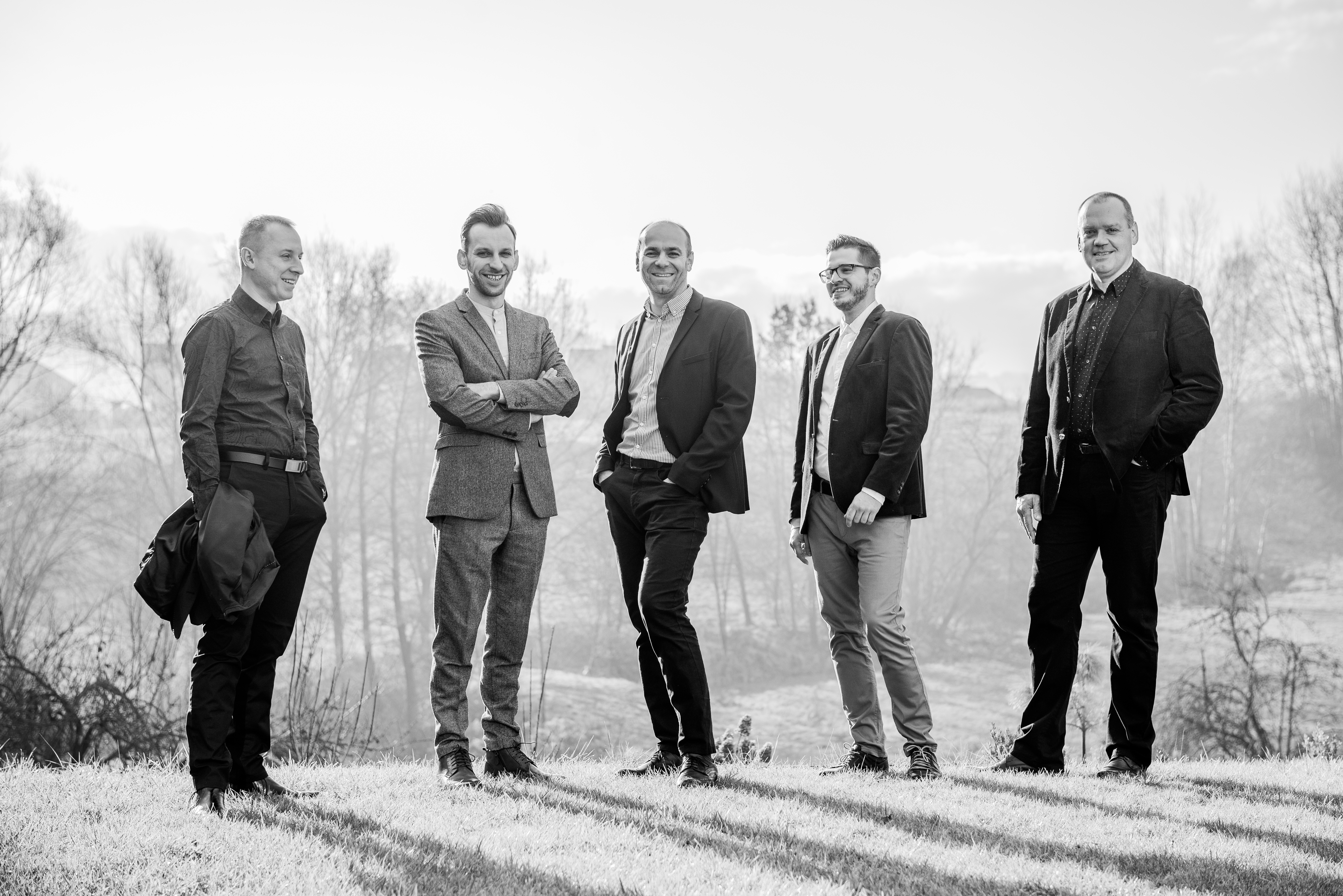 New Bone (sesja zdjęciowa do płyty "Longing", 2020 r.)